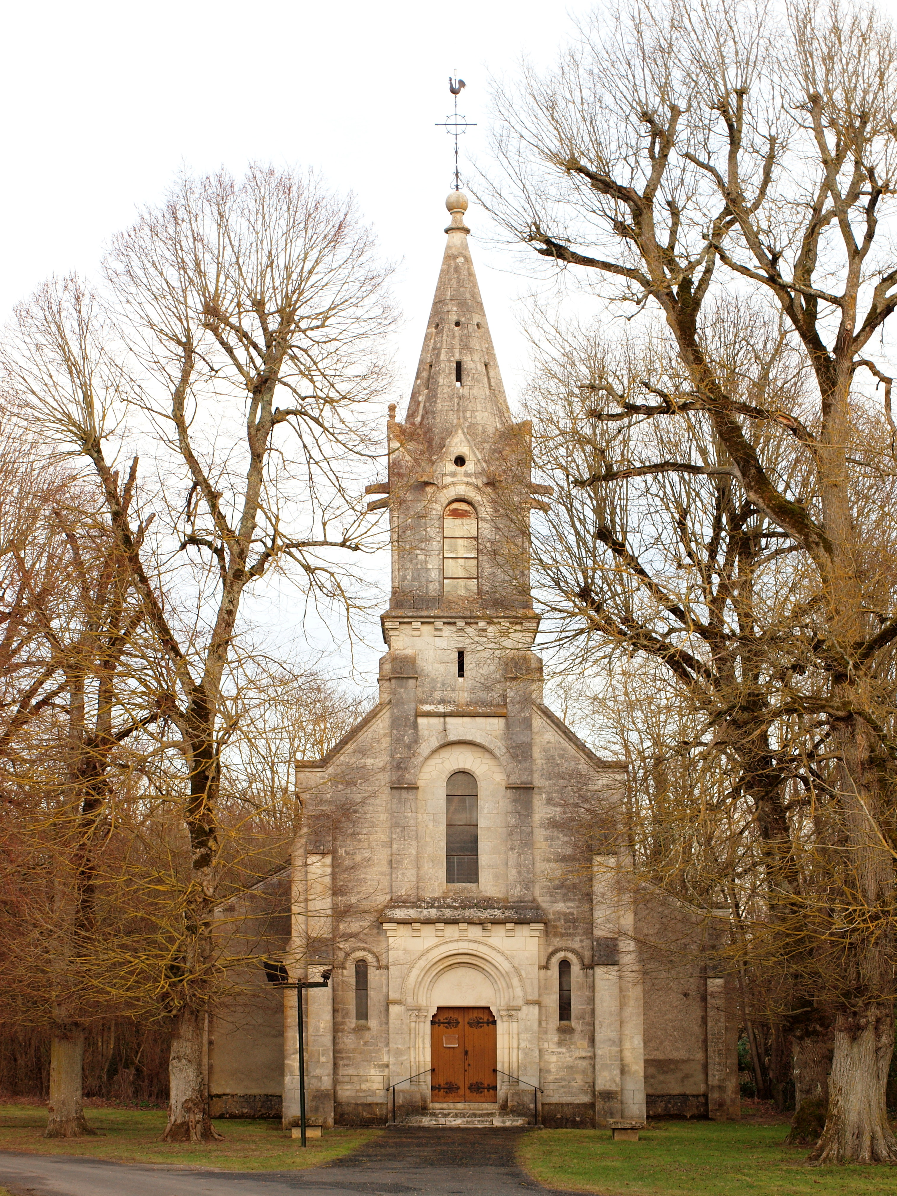 Brives (Indre, France) ; église